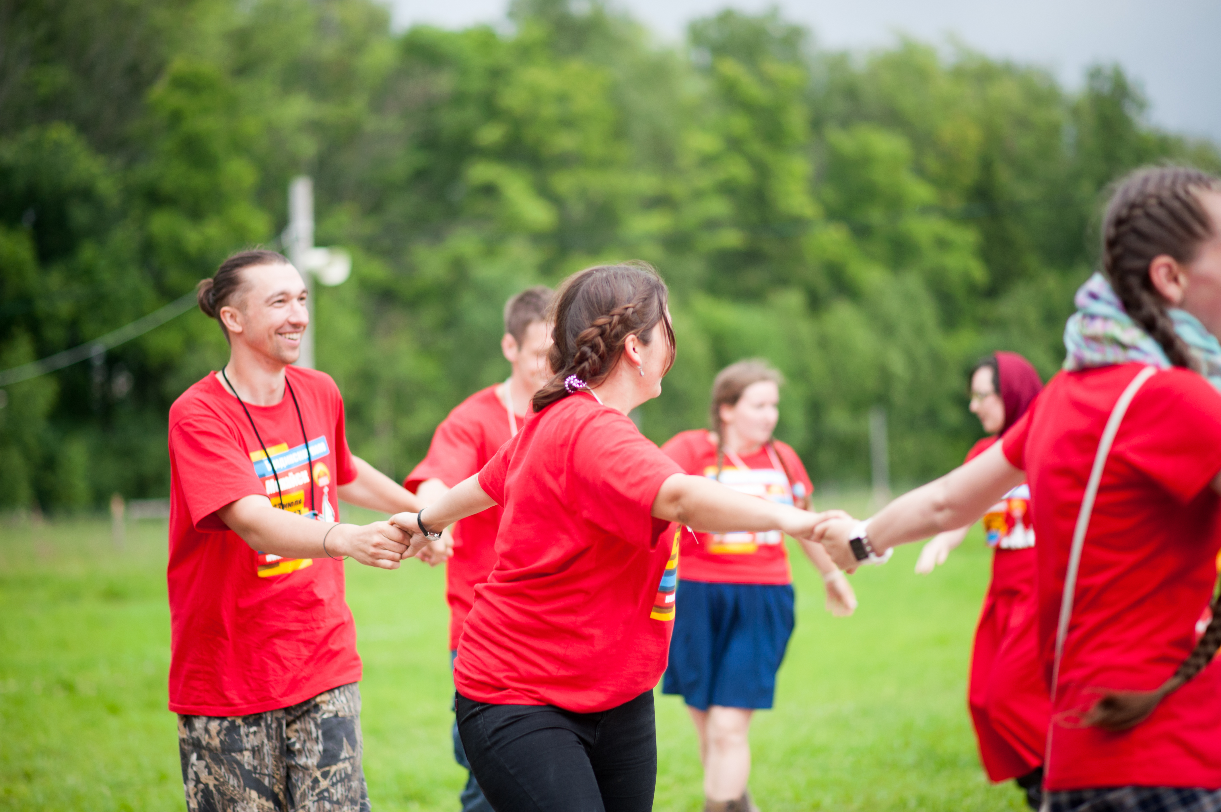 Хоровод из волонтёров